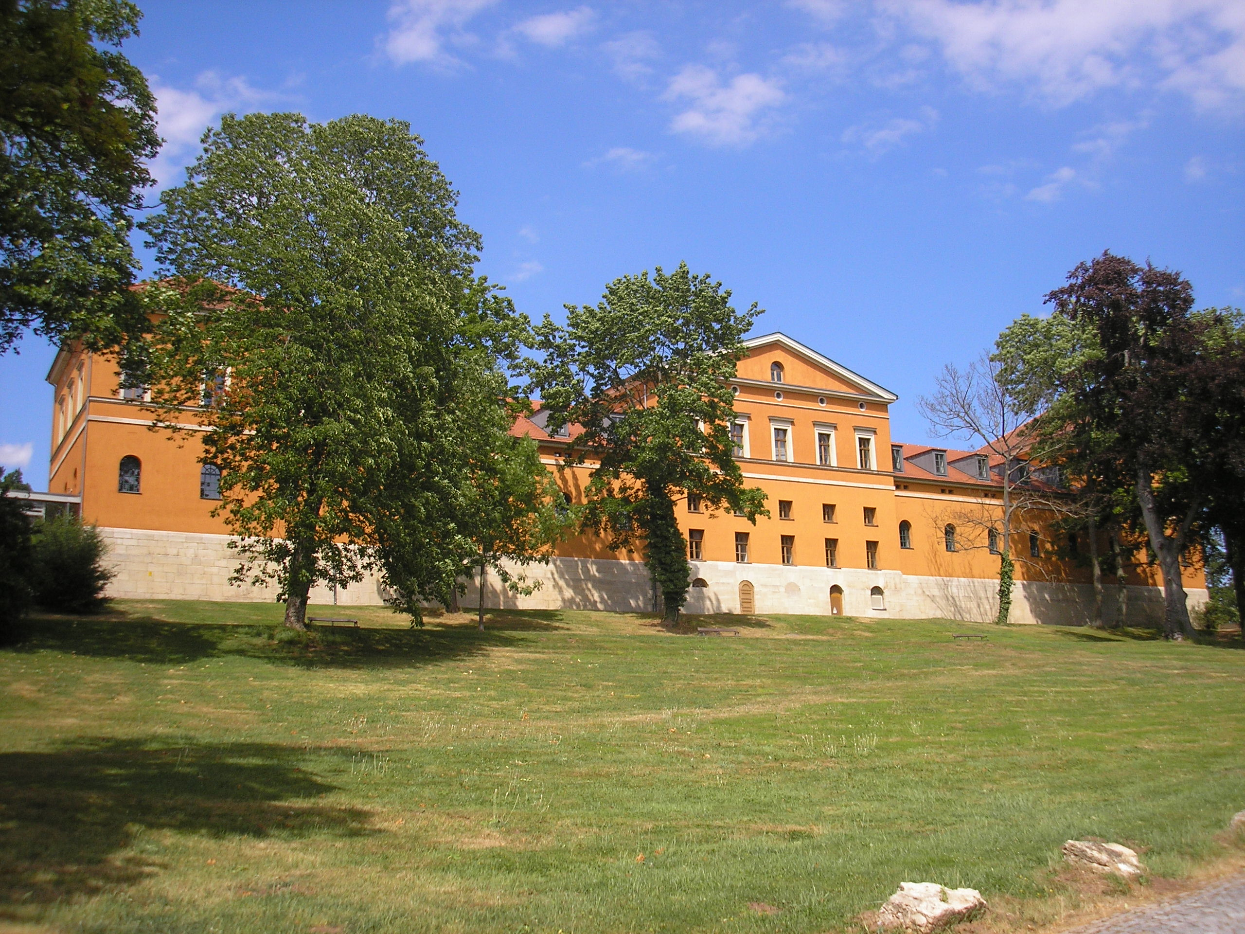 Der Marstall des Schlosses in Sondershausen (Thüringen).